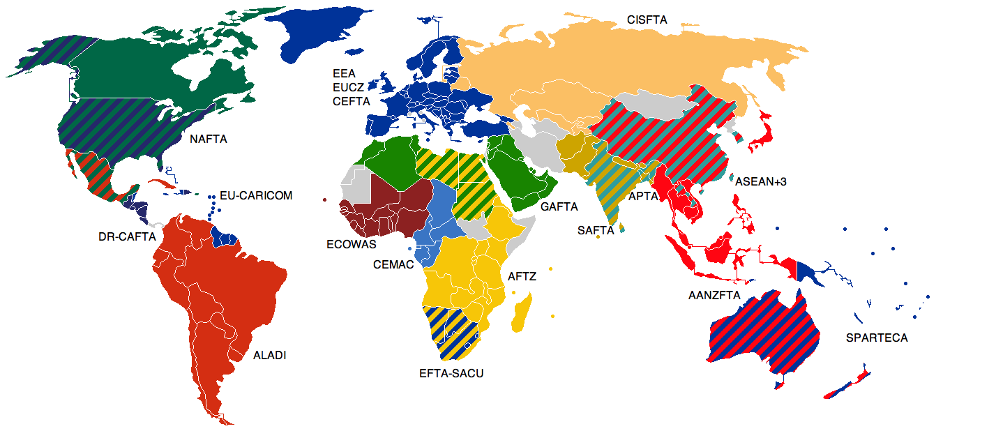 Free_Trade_Areas